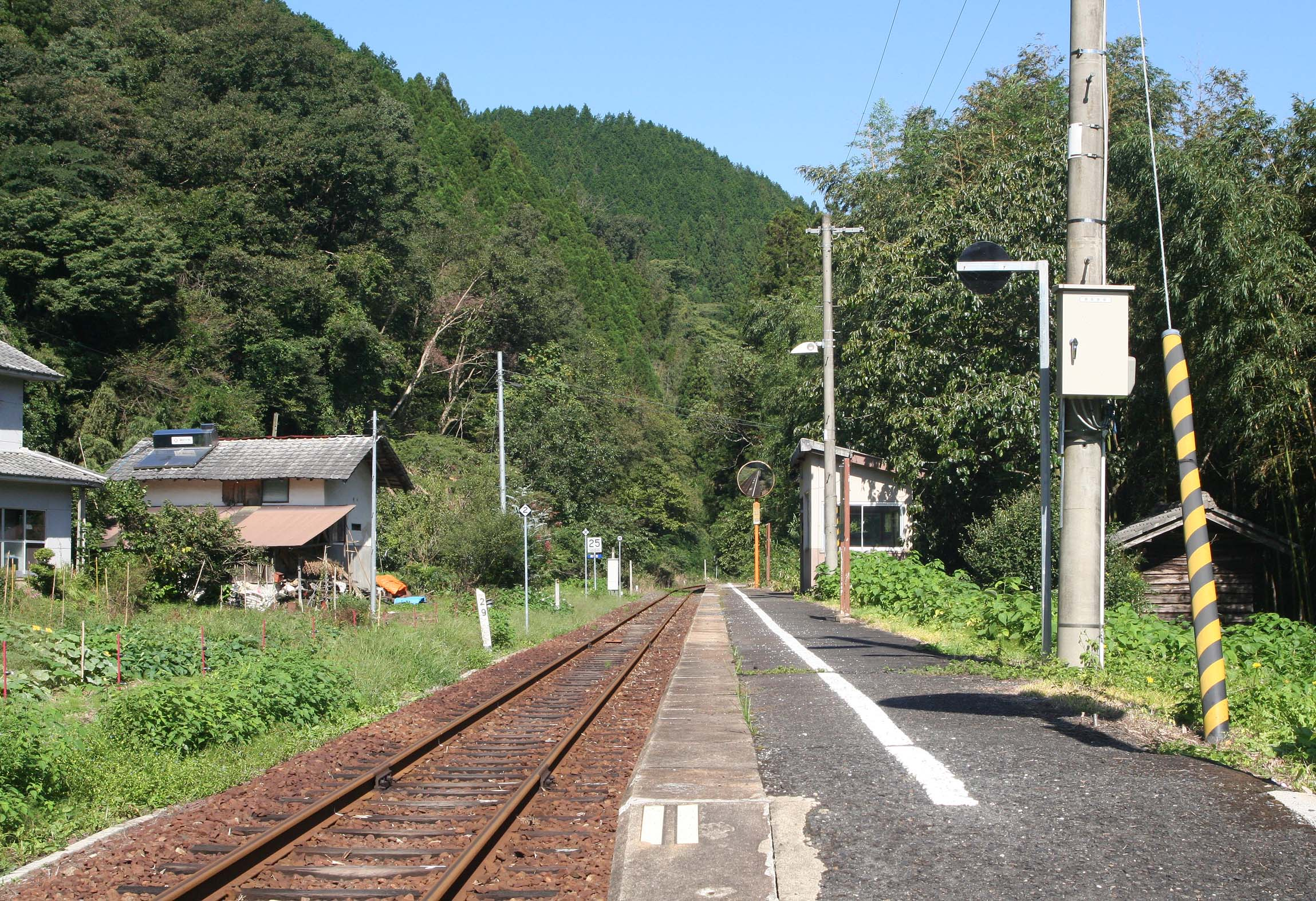 西日本旅客鉄道 内名駅の構内